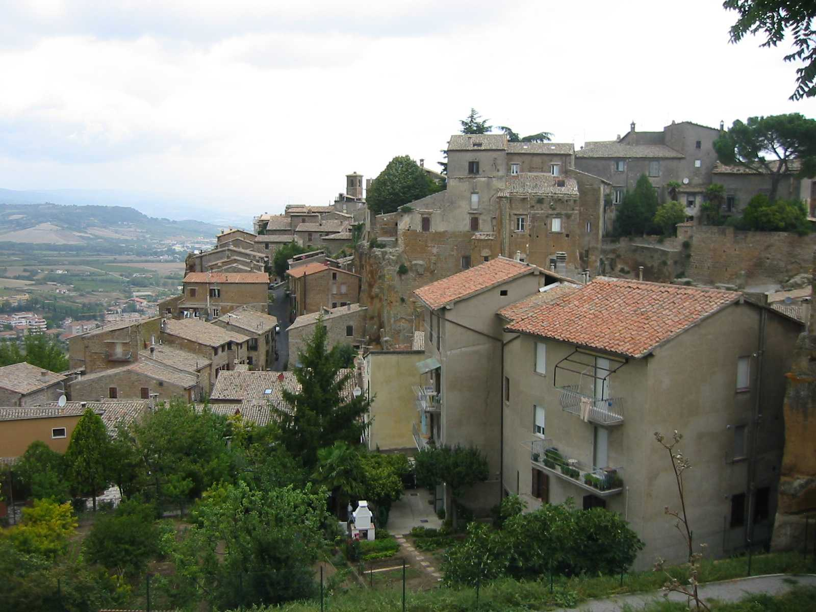 Orvieto